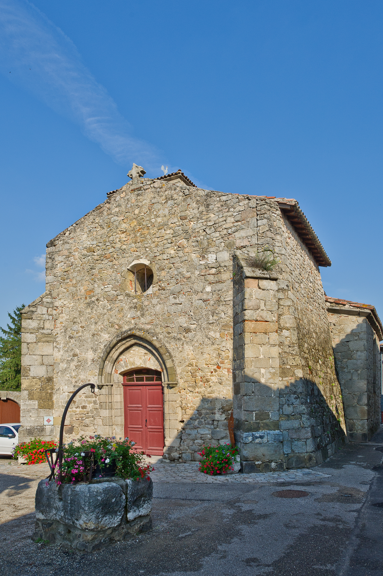 Ancienne église de Montagny (Rhône), (Inscrit, 1980) .